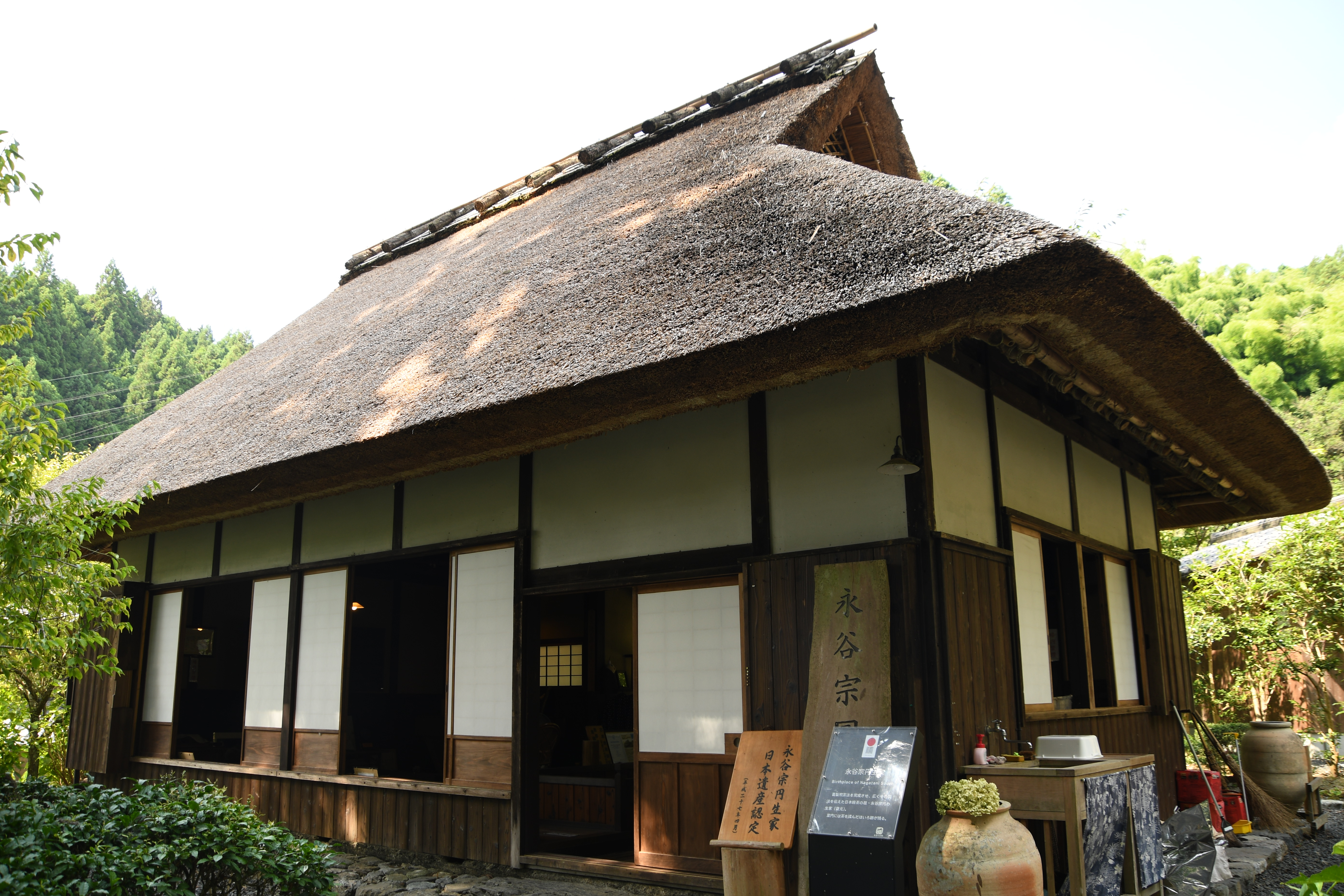 京都府宇治田原町湯屋谷 永谷宗円生家。2018年8月5日撮影。